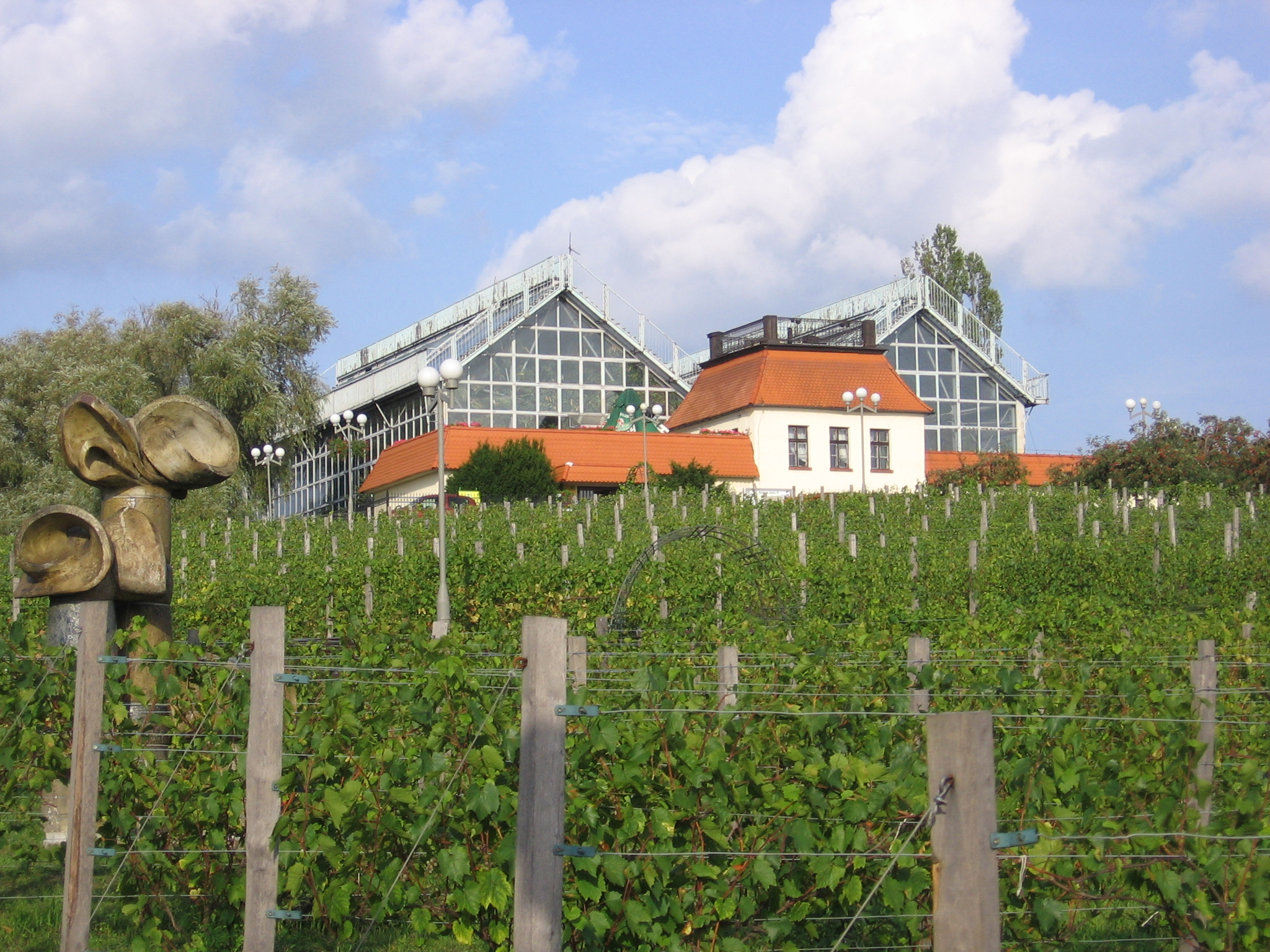 Zielona Góra, Palmiarnia Zielonogórska na szczycie Winnego Wzgórza